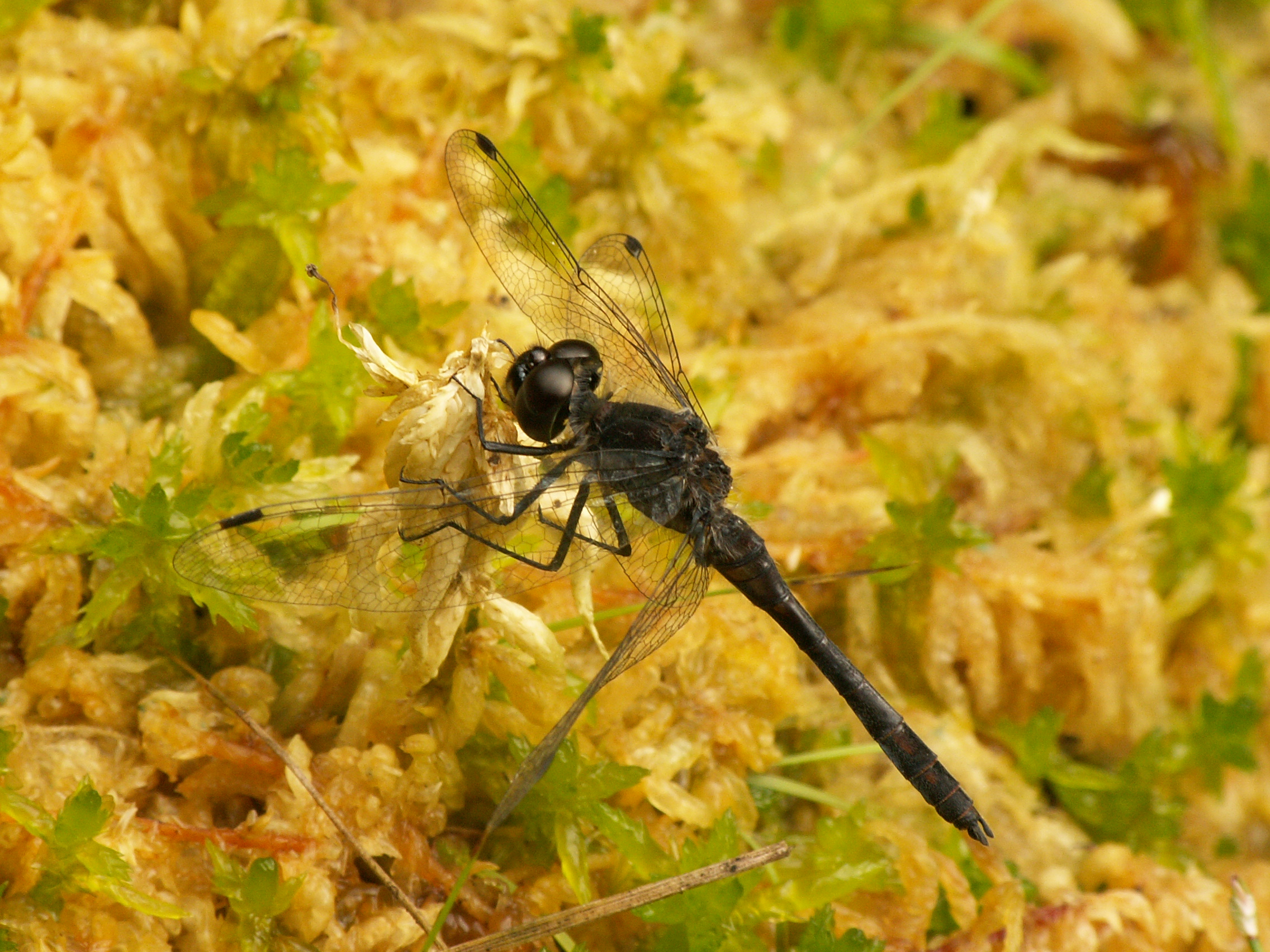 Sympetrum danaeMale all black